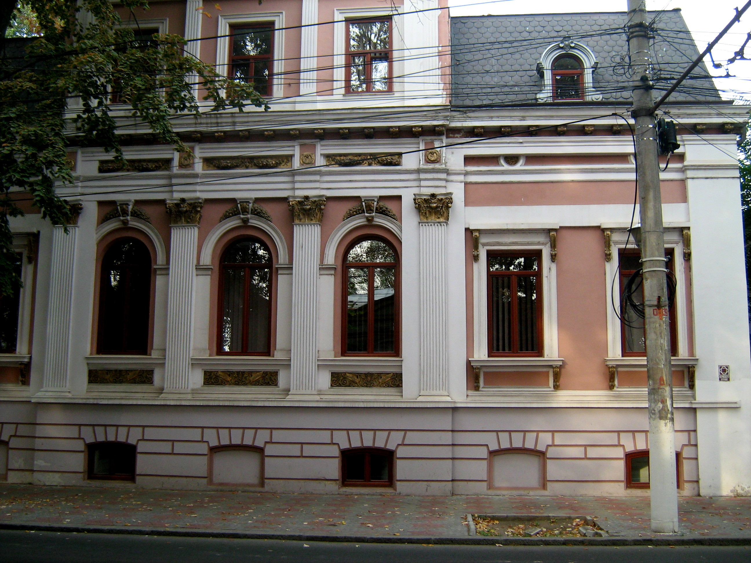 Galati, Casa Georgel Plesnila